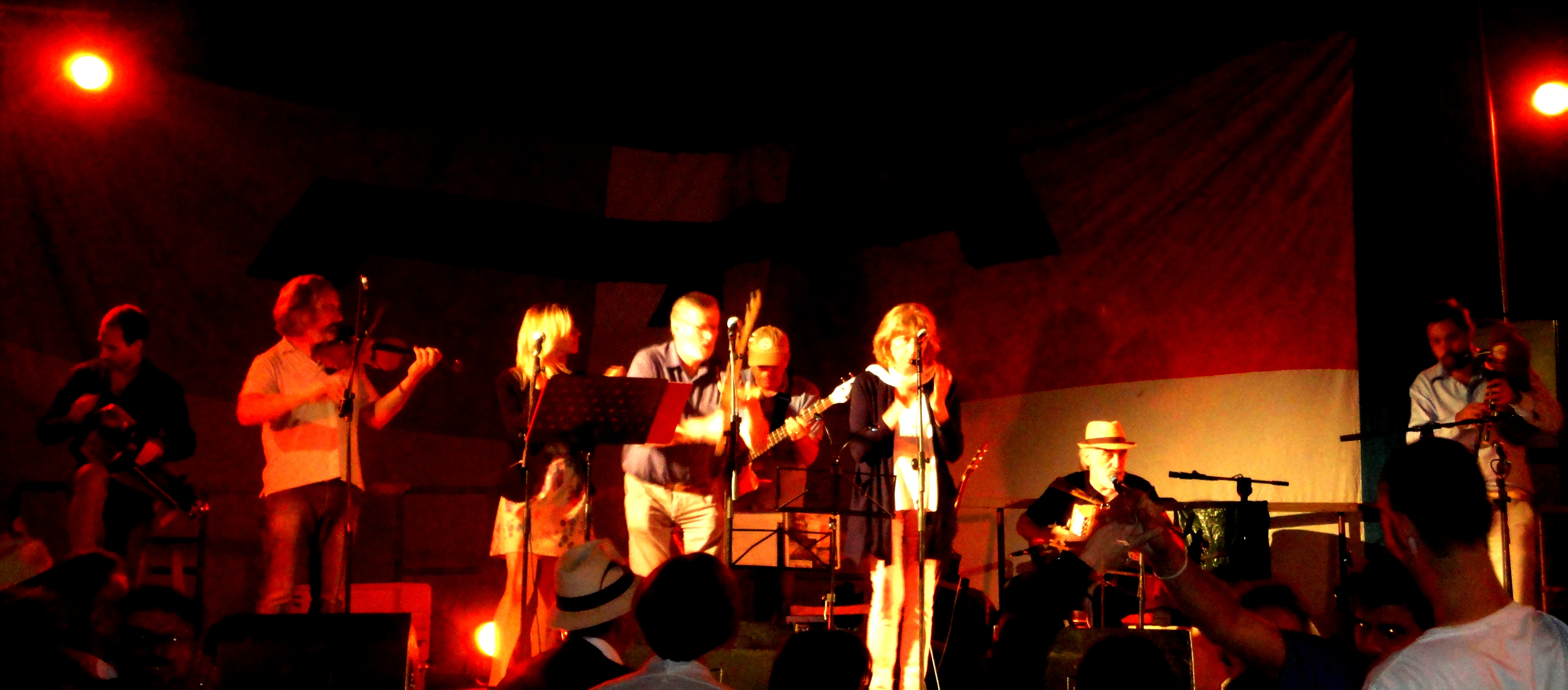 Musica della tradizione popolare piemontese